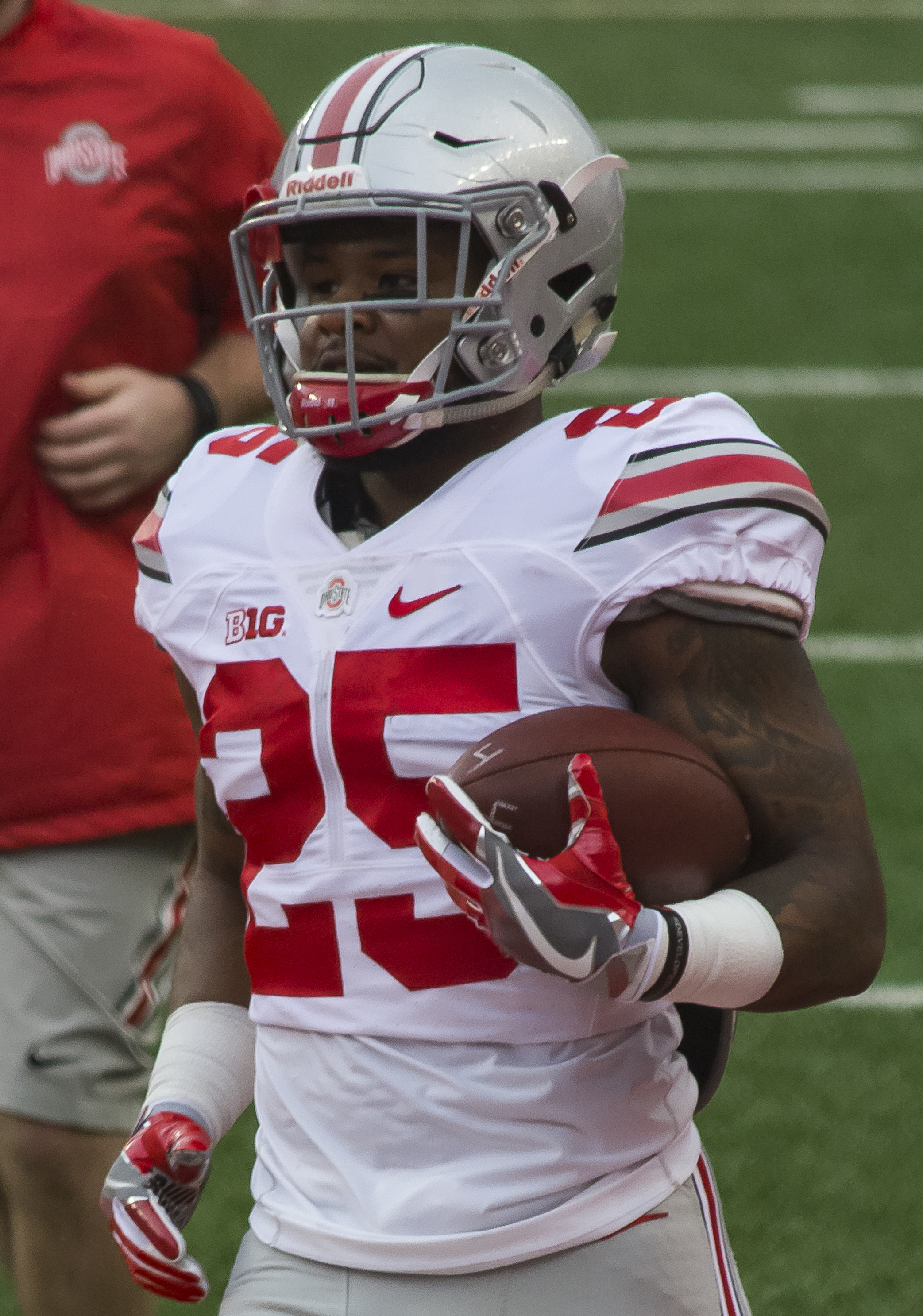 Mike Weber in 2017